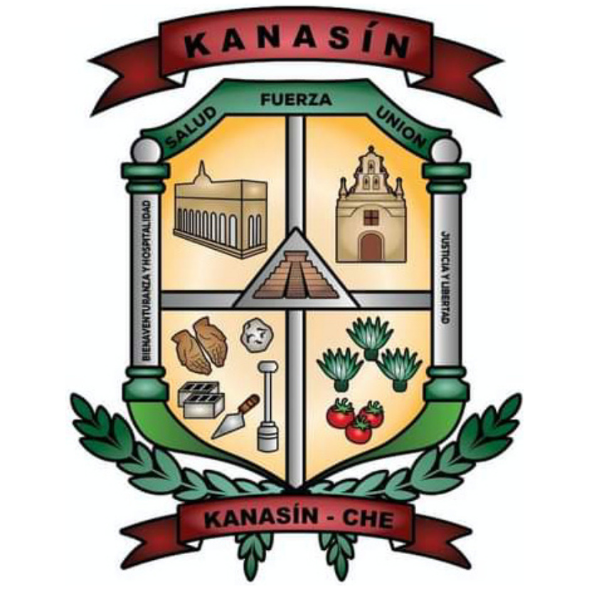 escudo de armas del municipio libre y soberano del estdo de yucatan